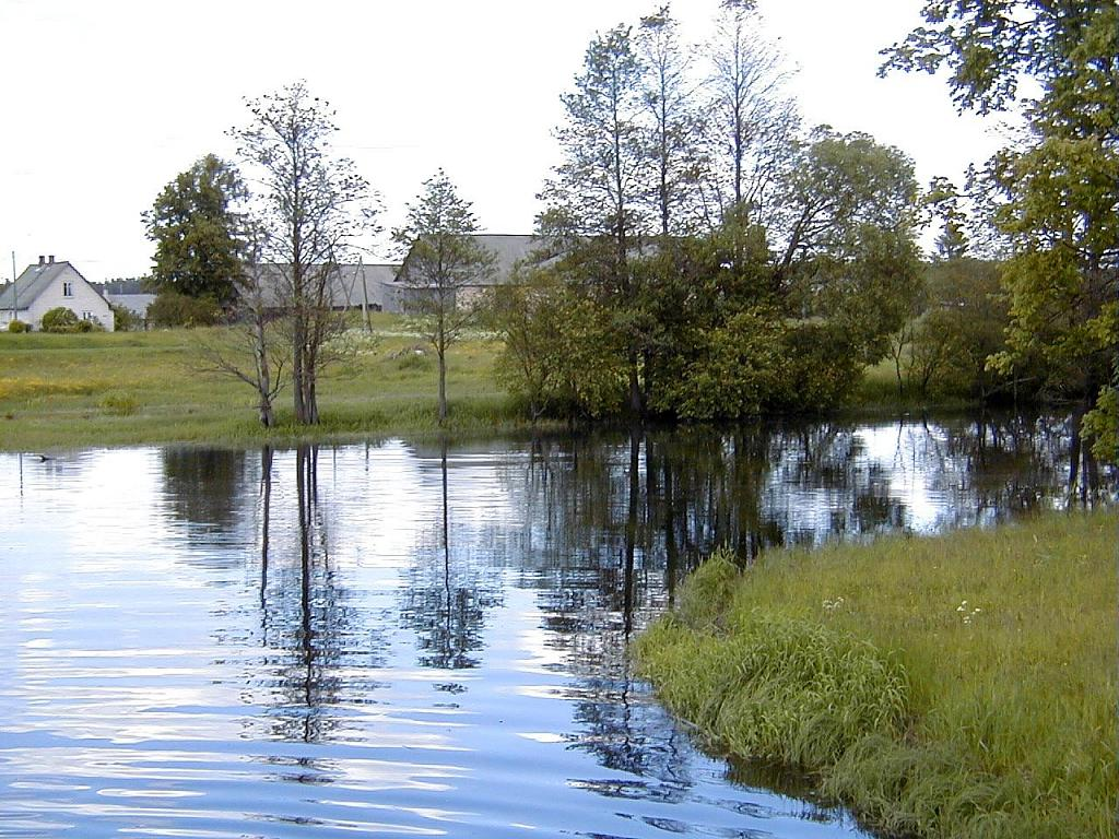 Pededzes dīķis pie Jaunannas. 2001-06-16